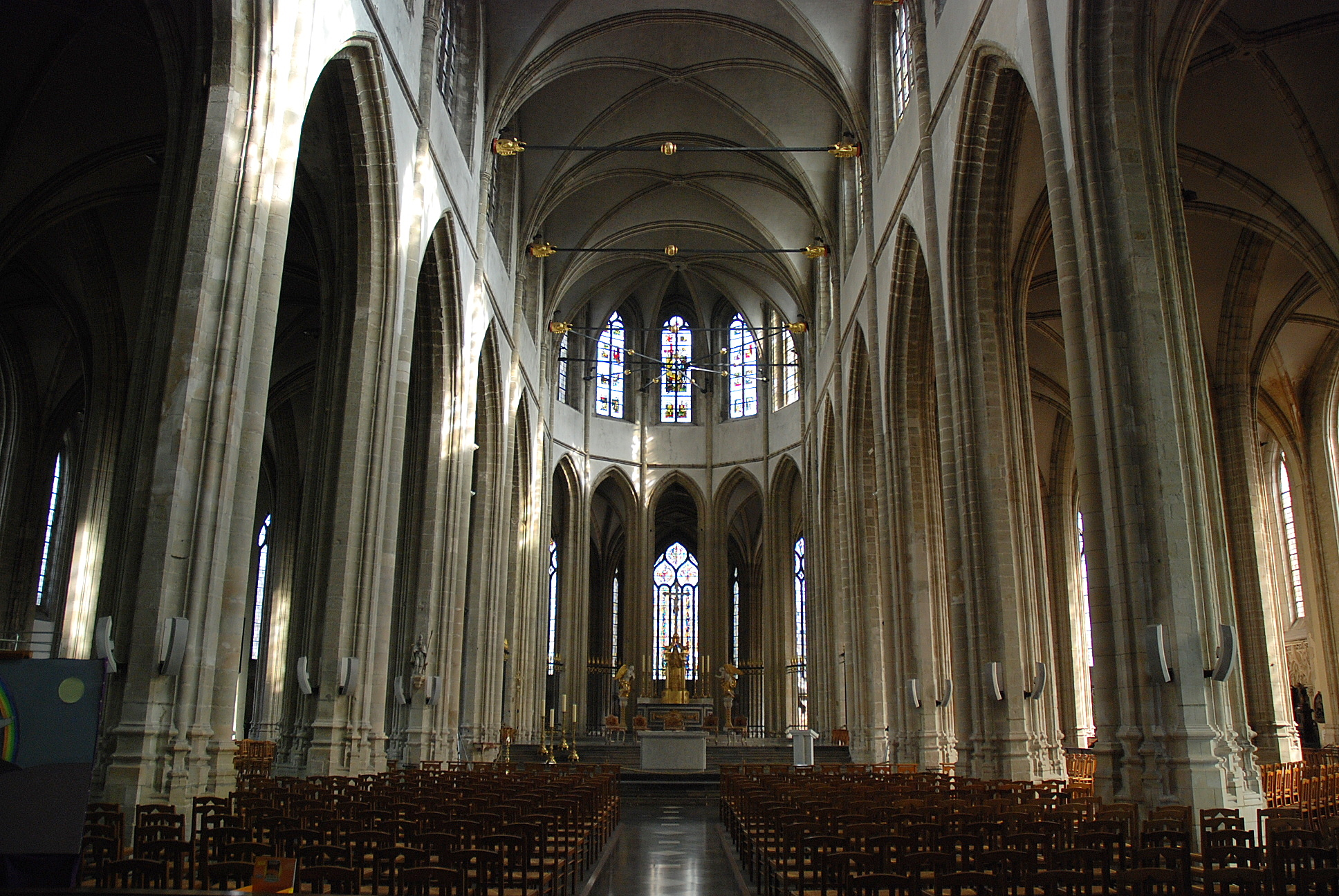 Eglise Saint Eloi à Dunkerque